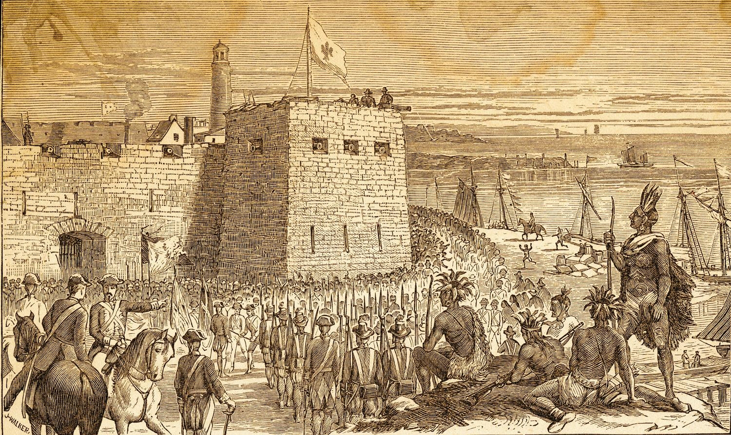 Fort Chouagen